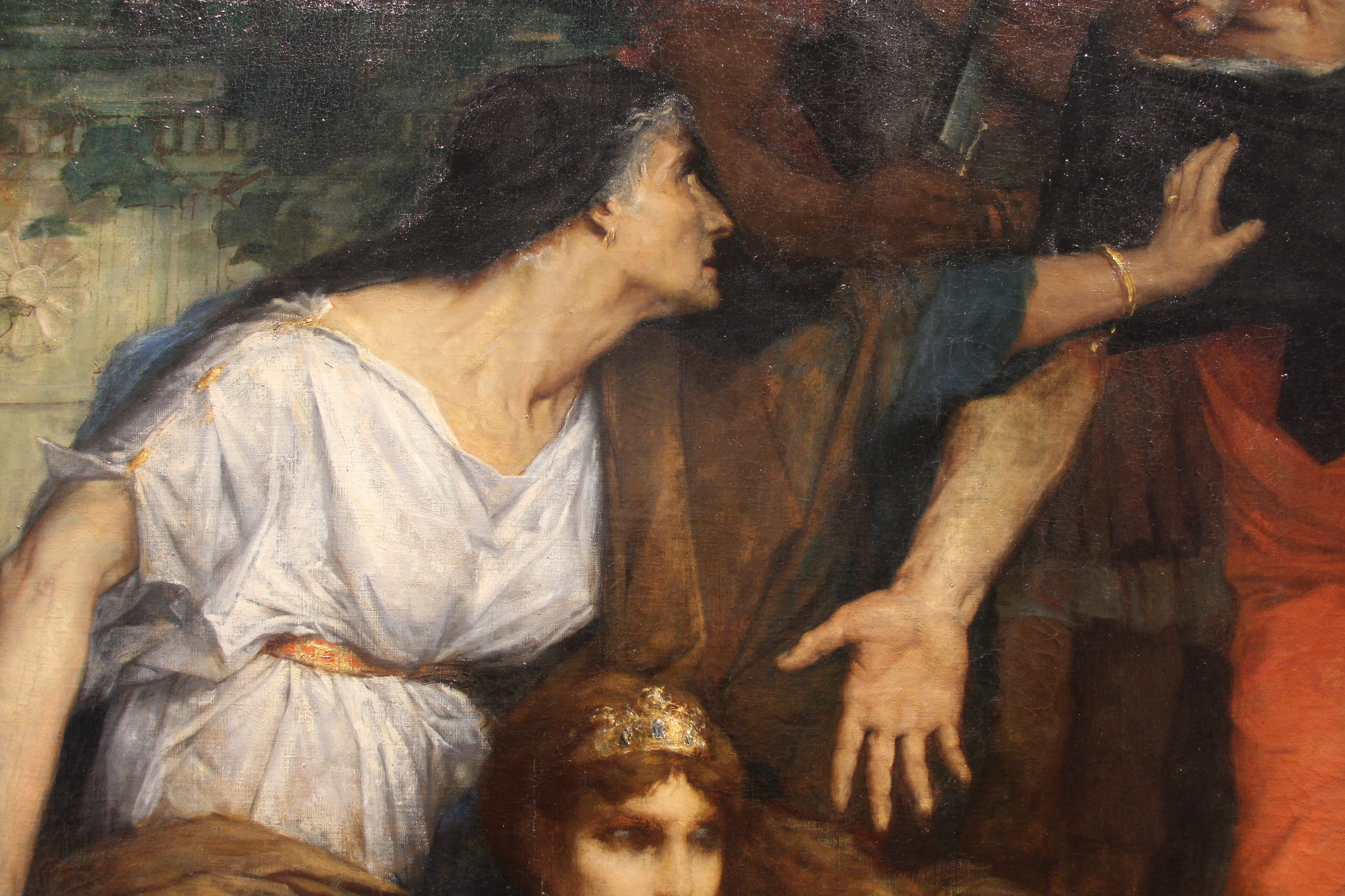 Huile sur toile, 1870.